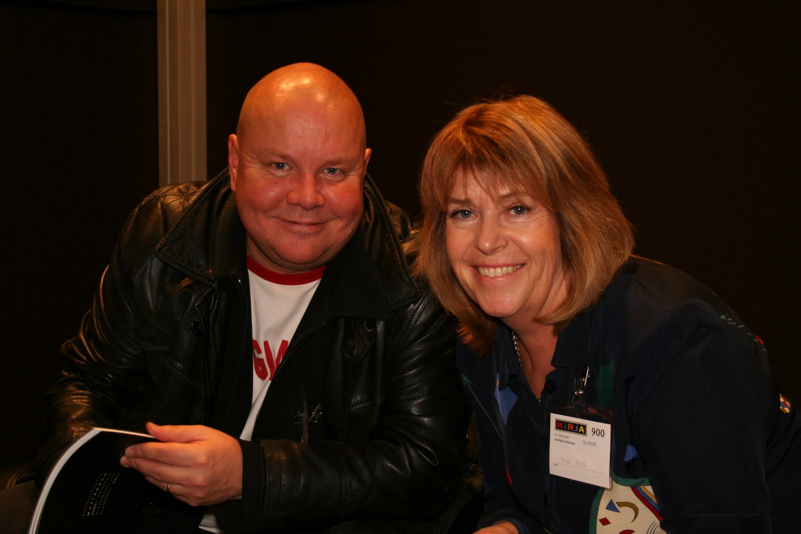 Tapani Kinnunen ja Eeva Park Helsingi raamatumessil.